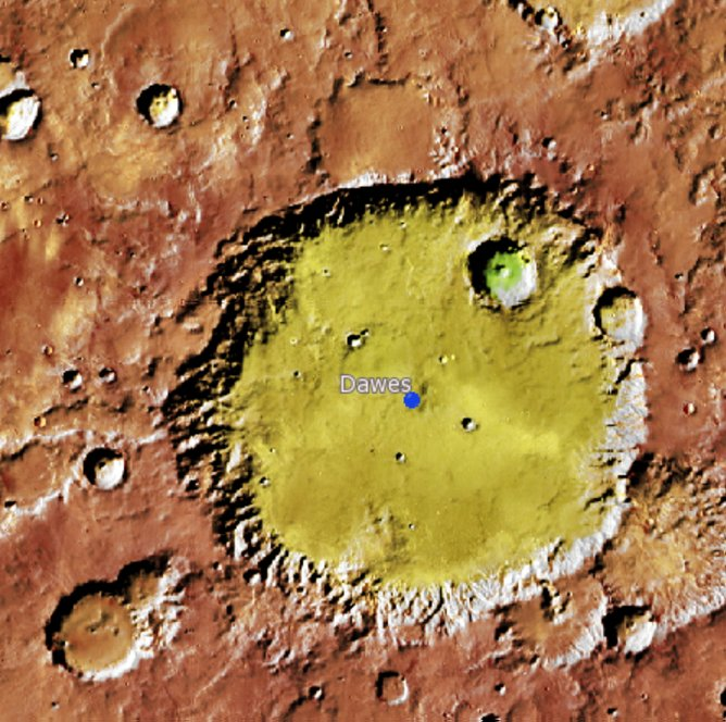 Cráter marciano Dawes (IAU USGS, Goddard/A SU/USGS